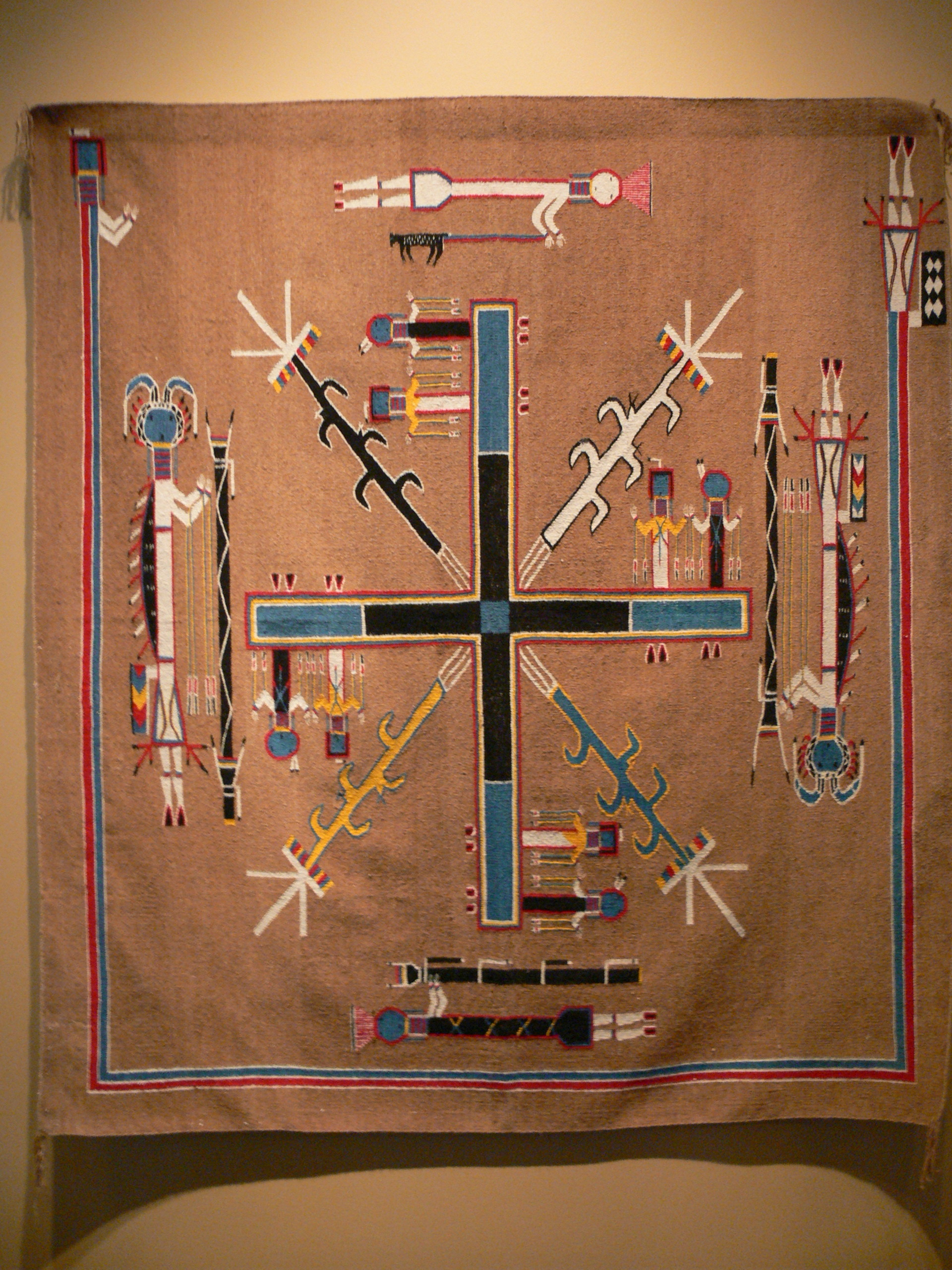 Tulsa, Oklahoma. Gilcrease Museum: Navajo sandpainting rug ( 1940 )